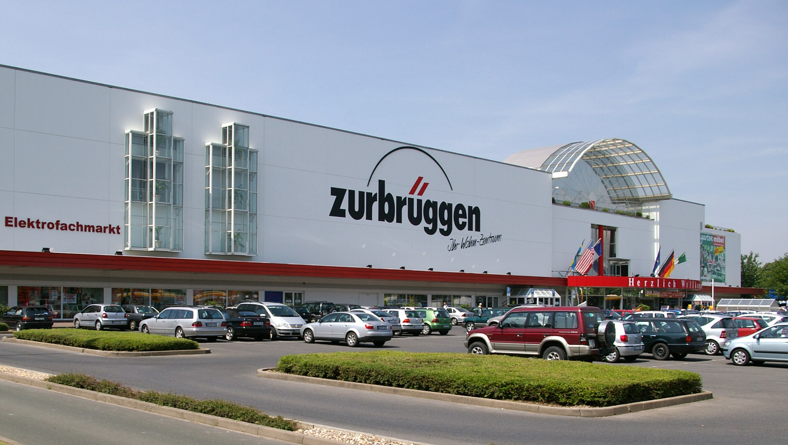 Unna, Zentrale der Firma Zurbrueggen